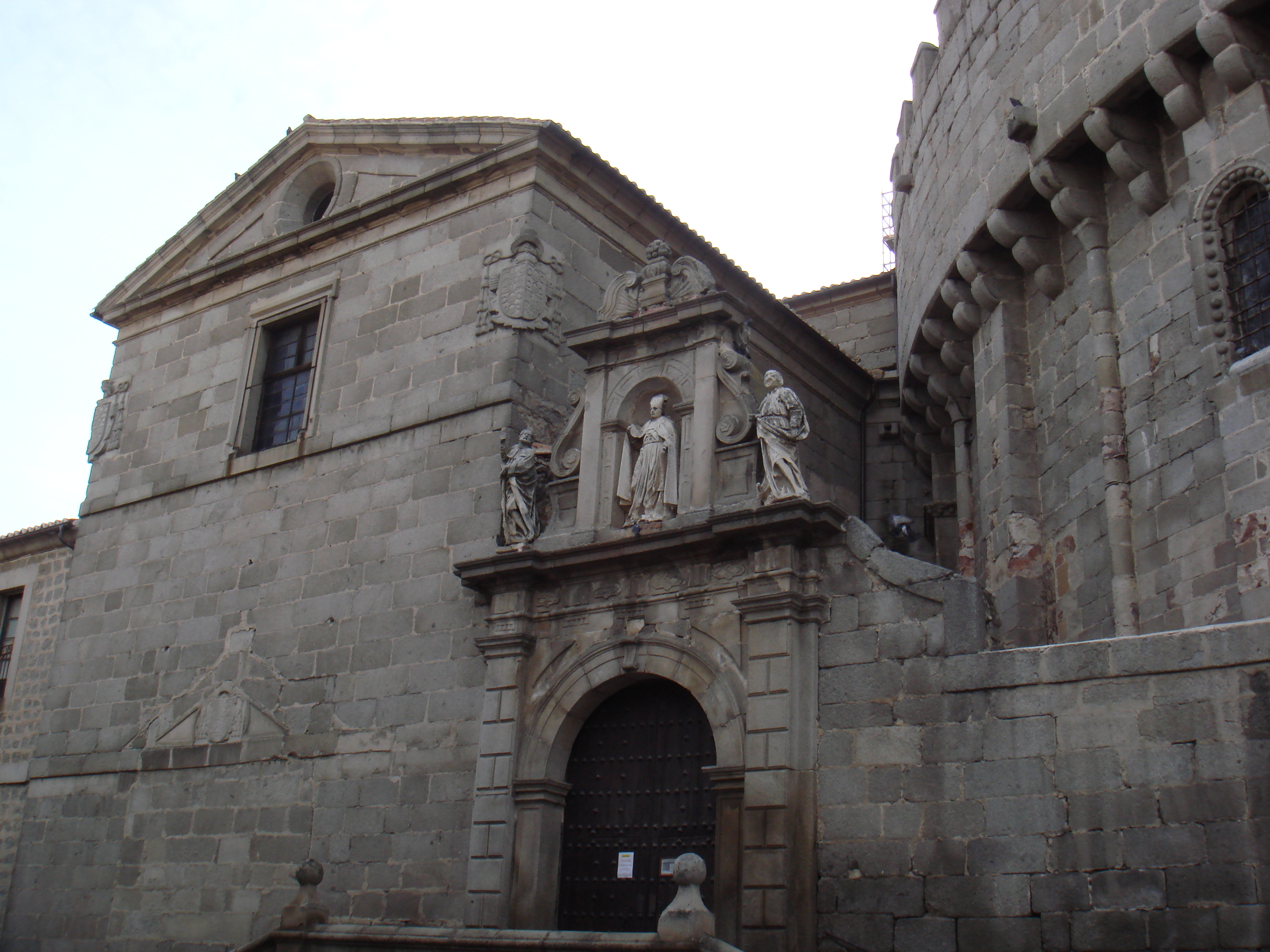 Entrada de la capilla de San Segundo de la catedral de Ávila (en el ábside).